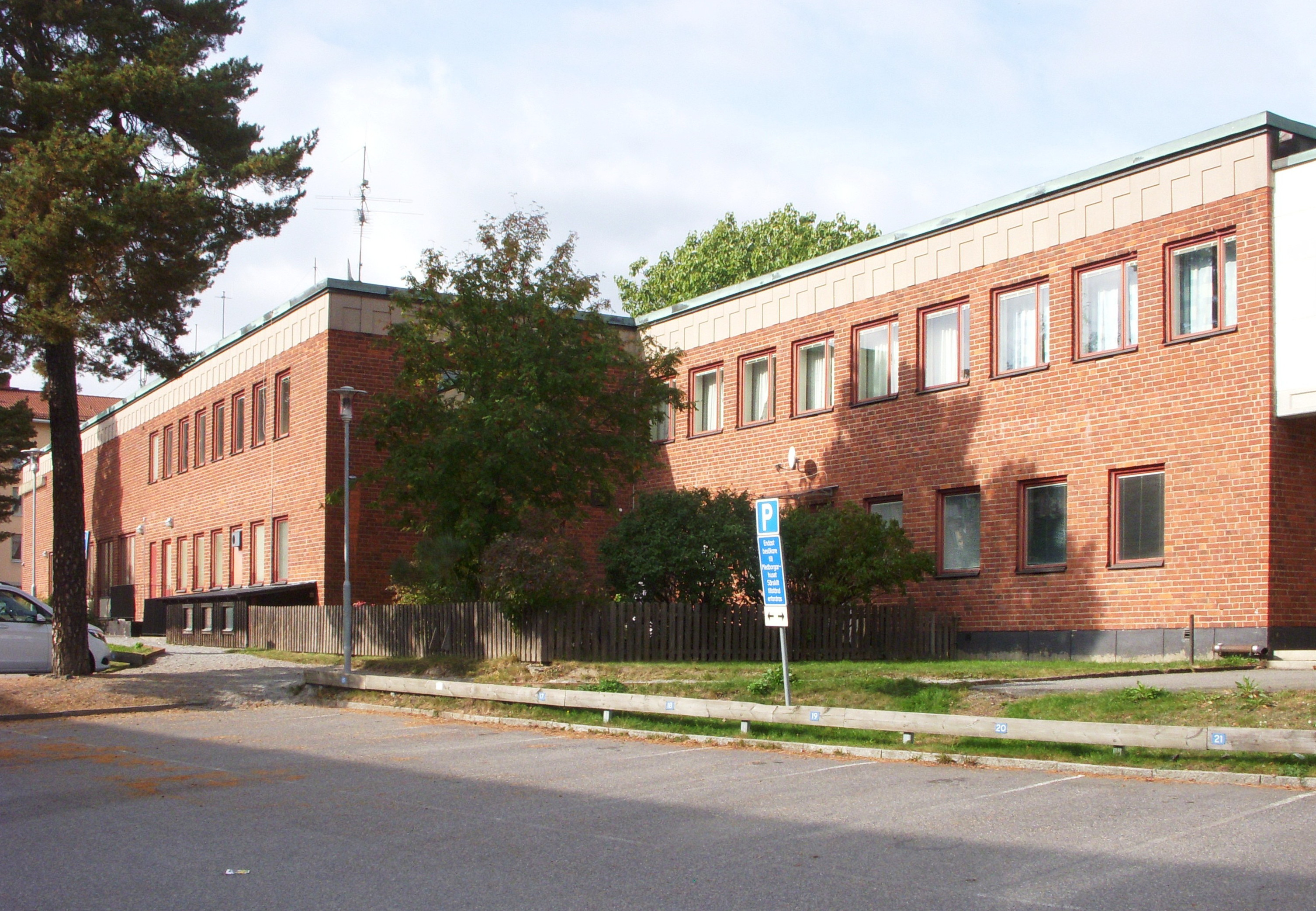 Medborgarhuset, Hägerstensåsen, arkitekt Ancker Gate Lindegren